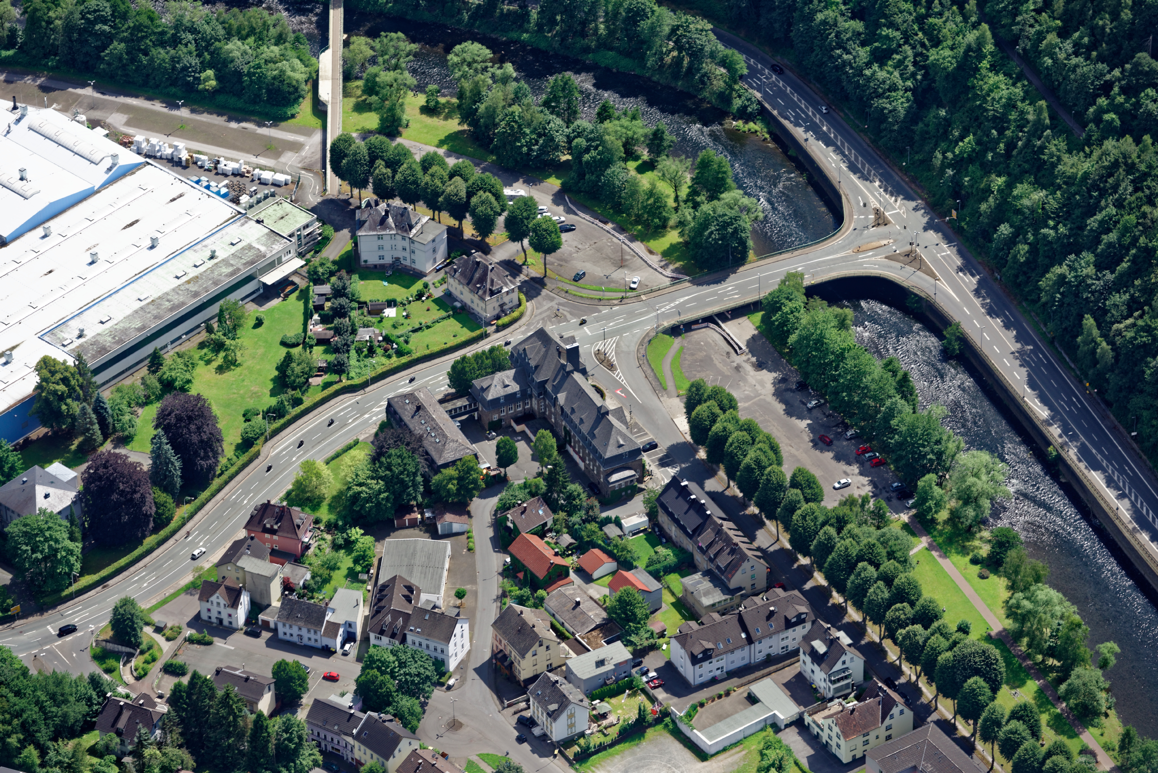 Fotoflug Sauerland West. Luftaufnahme: Rathaus Werdohl, Lenne, Lüdenscheider Straße und Versestraße (rechts), Nordrhein-Westfalen.